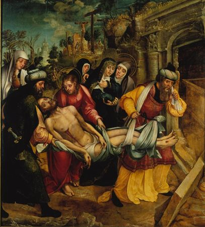 De acordo com uma nota escrita pelo Dr. José de Figueiredo no Livro 1º da Entrada de Correspondência, os seis quadros que formam o retábulo dito de Santos-o-Novo, estavam no coro de baixo da igreja do respectivo mosteiro no ano de 1911, data da entrada do conjunto no Museu das Janelas Verdes. Passa-se a transcrever parcialmente o documento citado (fl.6): "Em 22 do corrente (Agosto de 1911) esteve o Director do Museu no Recolhimento de Santos-o-Novo a receber vários objectos ali existentes, em virtude do despacho do Ex.mo Ministro da Justiça. Esses objectos, entregues ao Director na presença de dois vogais da Comissão Jurisdicional das Extintas Congregações, são: 6 quadros de madeira do século XVI escola de Lisboa, representando respectivamente a «Anunciação», «Natividade», «Adoração dos Reis Magos», «Cristo no Horto», «Enterro de Cristo» e «Ressurreição de Cristo» e estavam no coro de baixo da referida Igreja;..." (cf. João Couto, O retábulo quinhentista de Santos-o-Novo, p.13, nota 1).